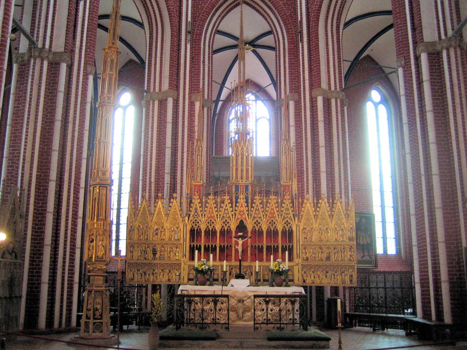 Hochaltar im Doberaner Münster